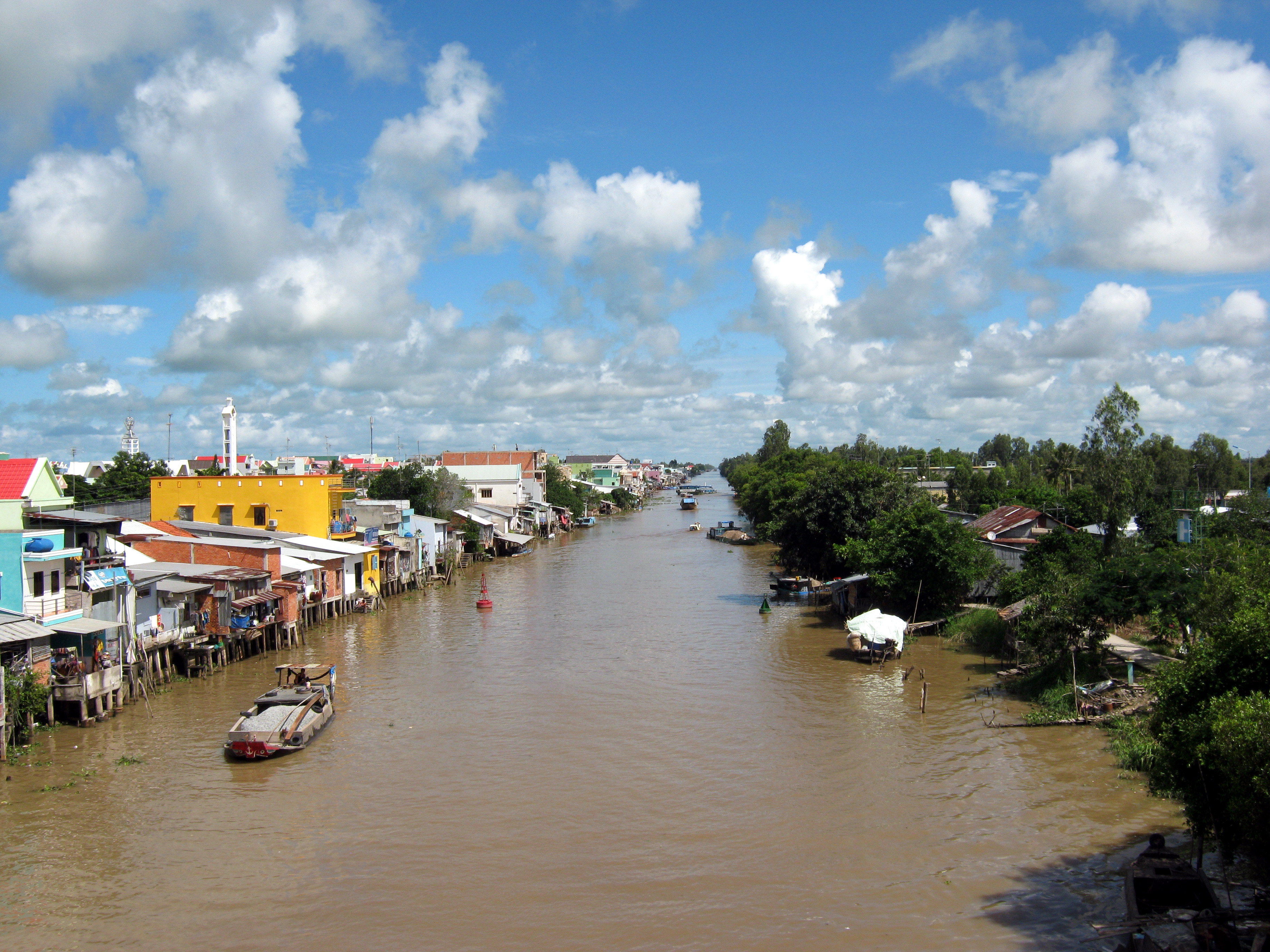 Kênh đào Rạch Giá - Hà Tiên, đoạn chảy qua thị trấn Hòn Đất thuộc huyện Hòn Đất, tỉnh Kiên Giang, Việt Nam.